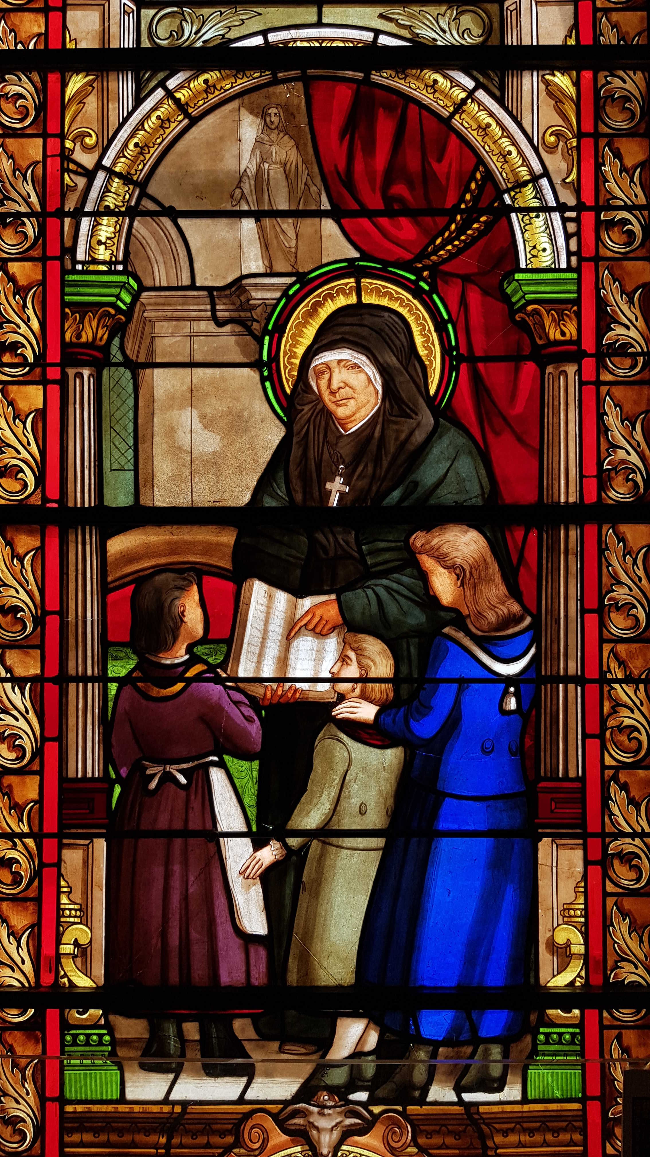 Marie Rivier, Bildfenster in der Mutterhauskapelle der Soeurs de la Présentation de Marie, Bourg-Saint-Andéol